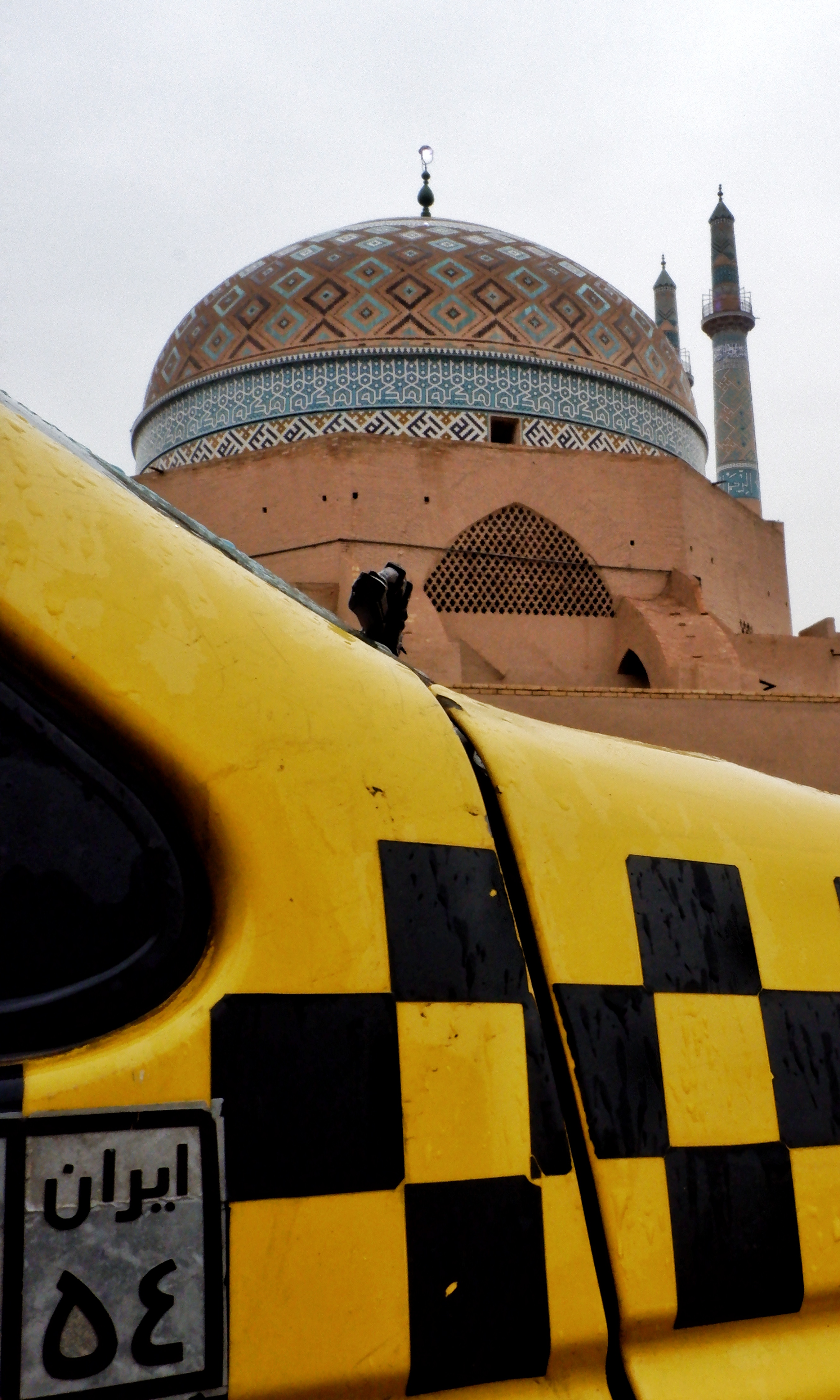 این عکس در ۱۴ دی‌ماه ۹۸ توسط اسحاق محمدی ثبت شده.